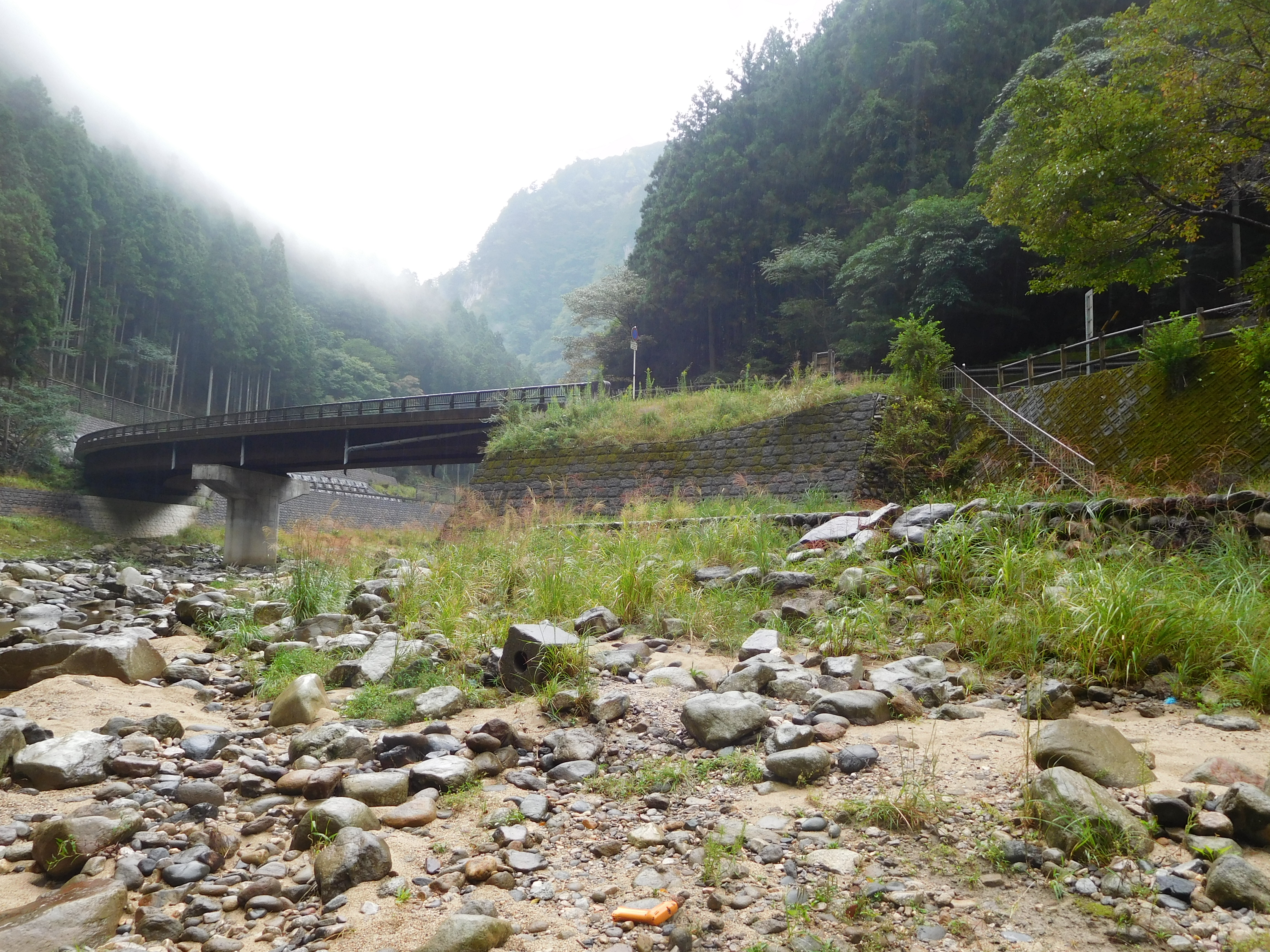 三重県名張市青蓮寺・中知山を通る三重県道81号名張曽爾線。香落渓・紅葉谷にて。